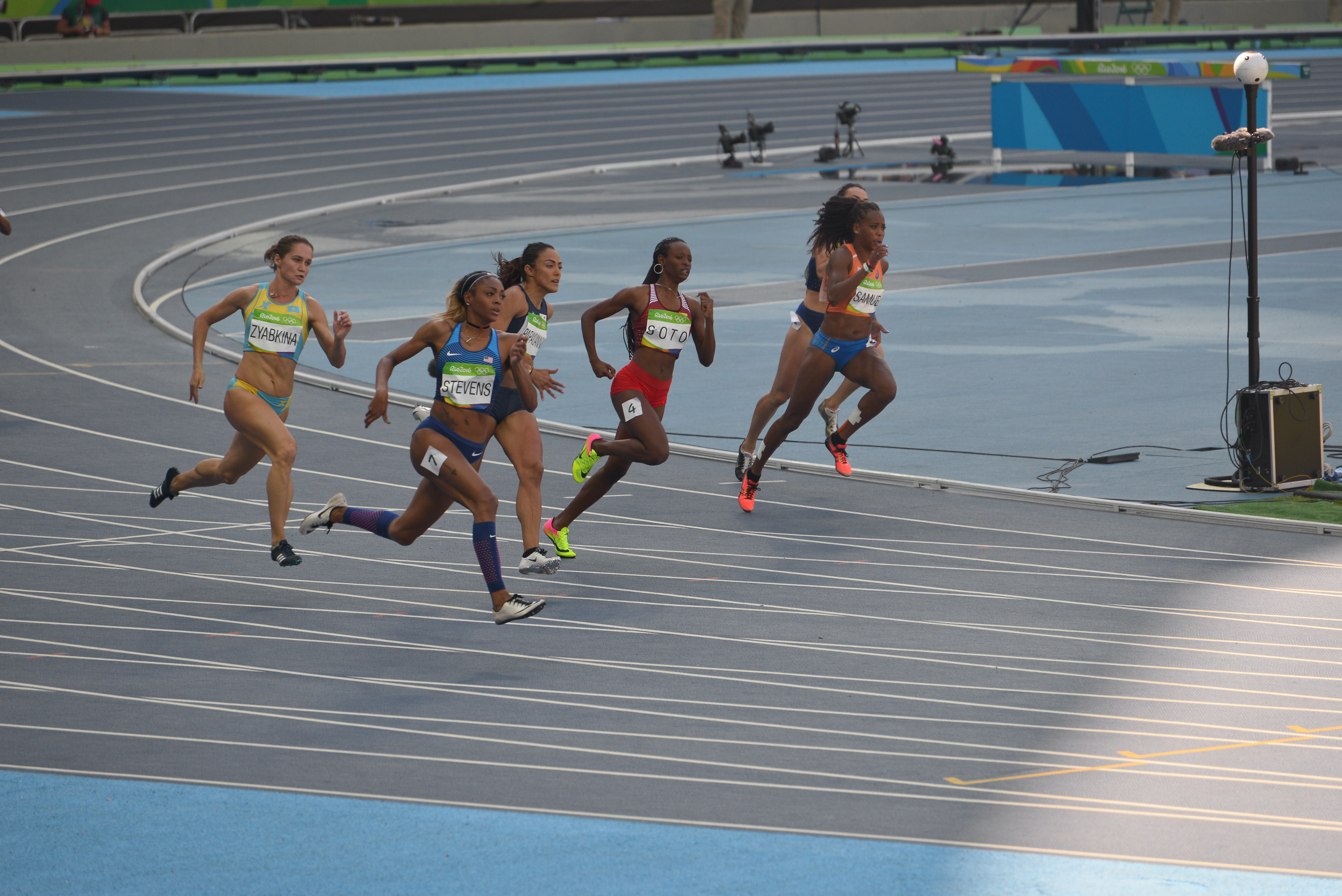 La 6ème série du 200m féminin des jeux olympique de Rio, 2016